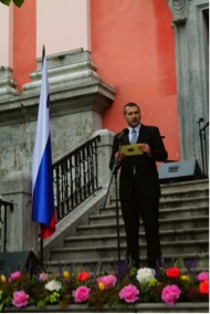 dr. Damir Črnčec na shodu Pride čas, ko ni več časa